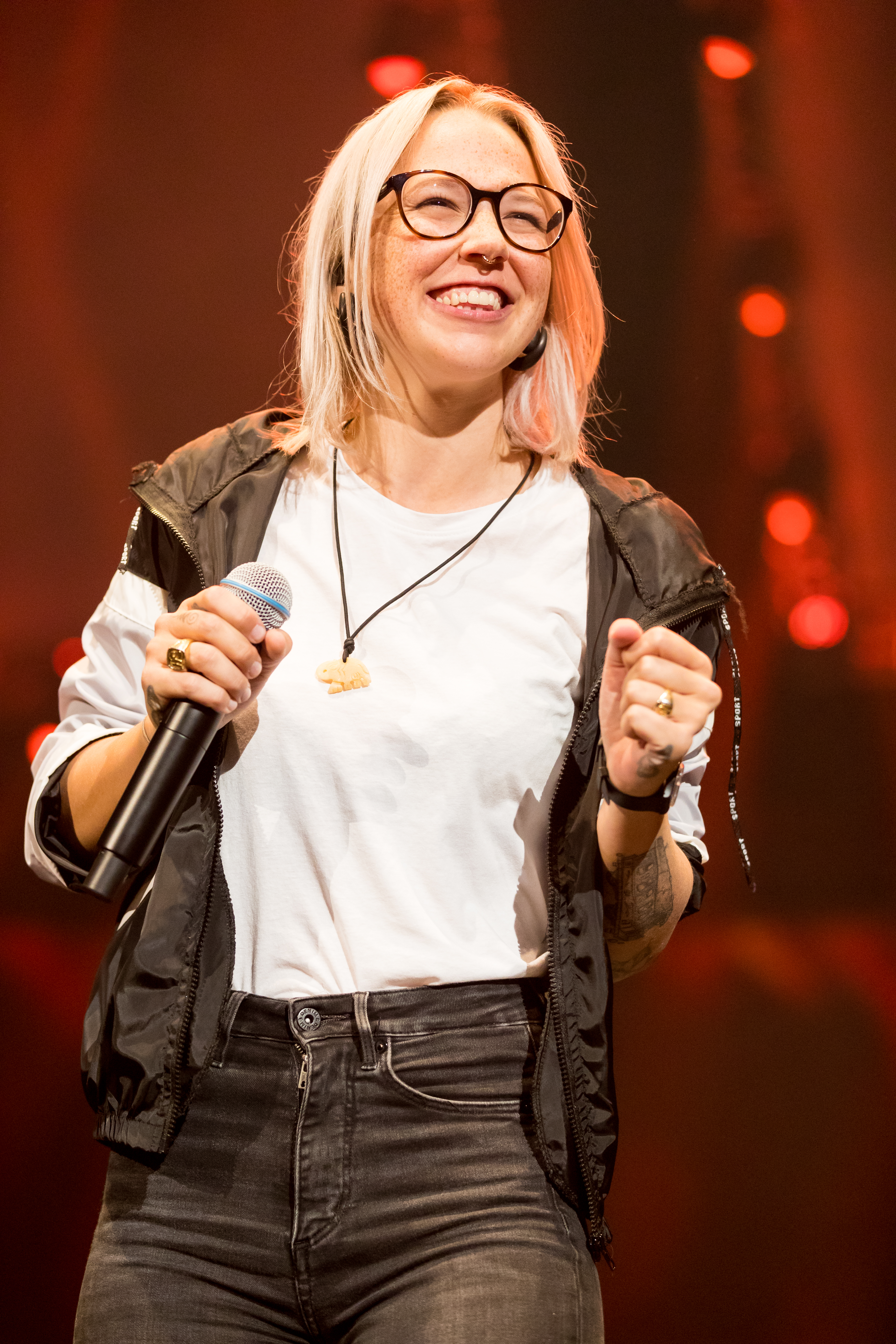 Stefanie Heinzmann during 30 Jahre Radio Regenbogen at SAP Arena, Mannheim, Mannheim, Germany on 2018-04-21, Photo: Sven Mandel